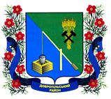 Герб Добропольского района Донецкой области